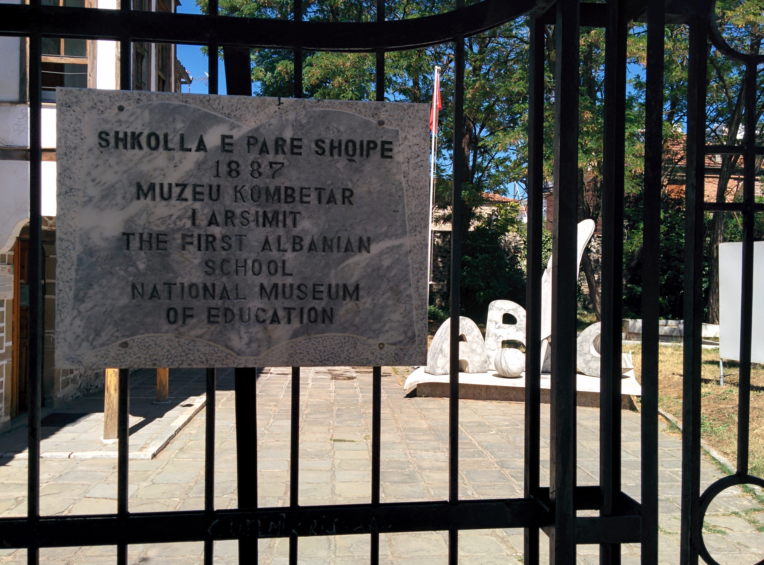 Mesonjetorja e Pare Shqipe